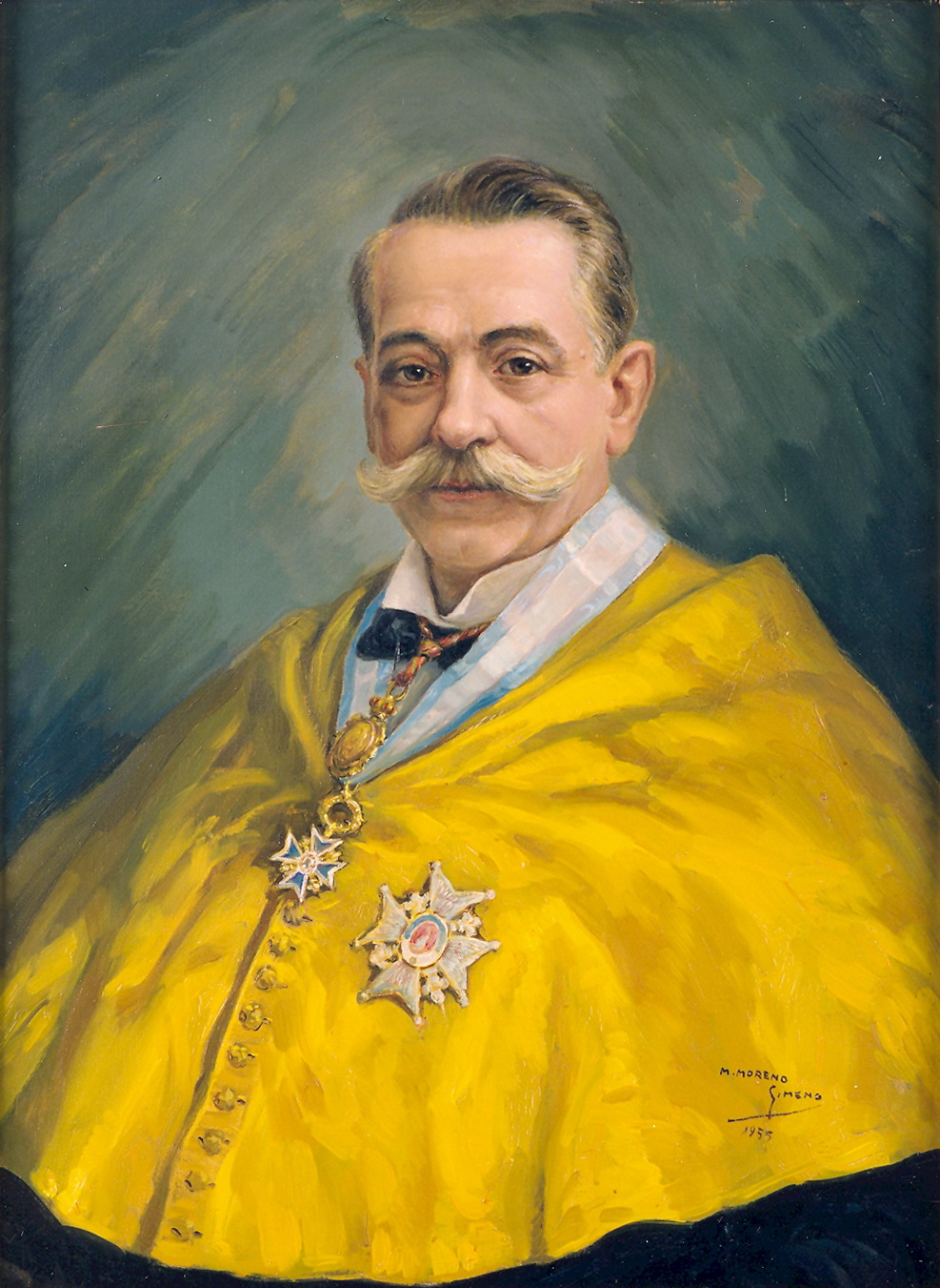 Retrato del Decano de Medicina de Valencia, Doctor Nicolás Ferrer Julve